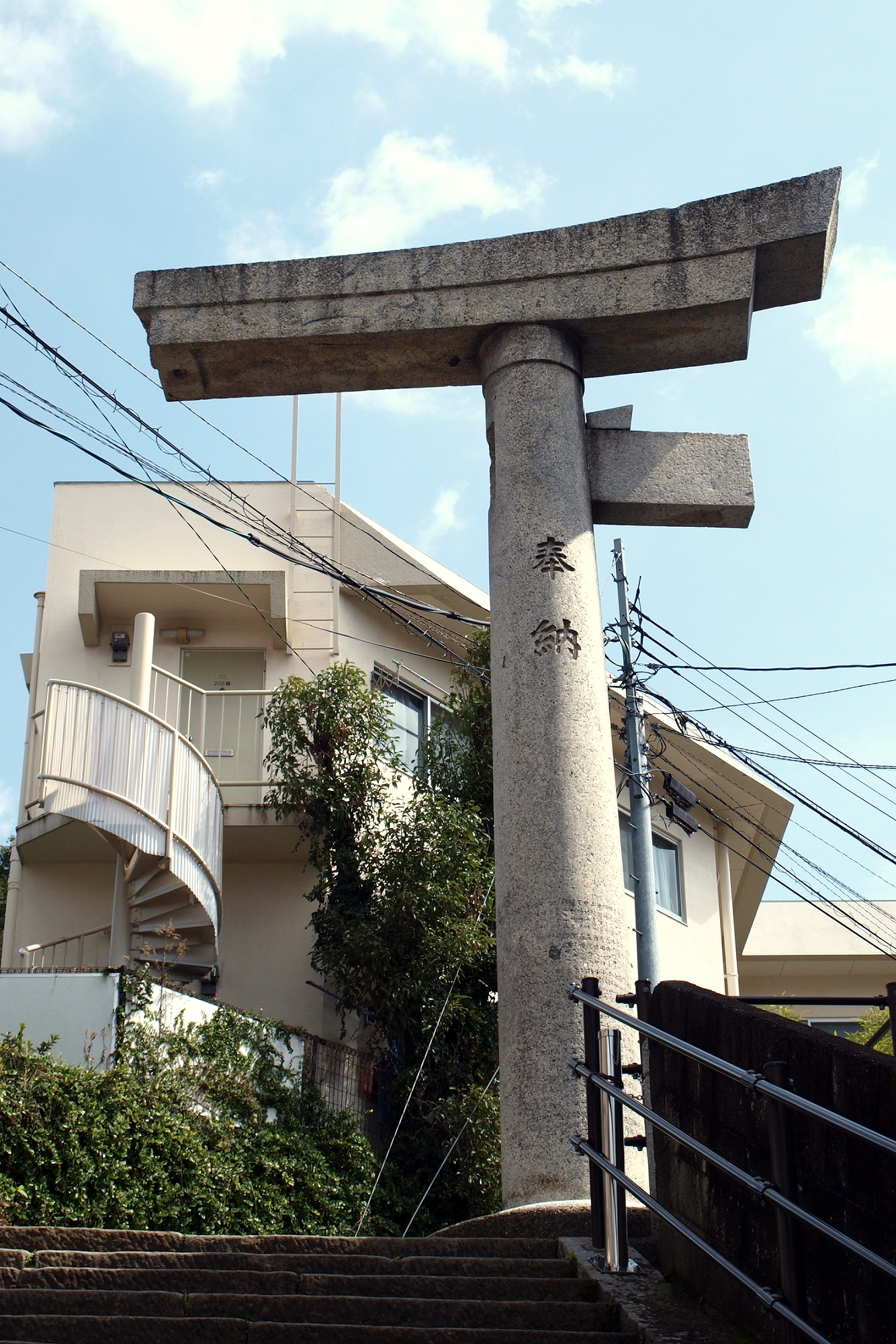 長崎県長崎市 山王神社 二の鳥居（通称：一本柱鳥居）